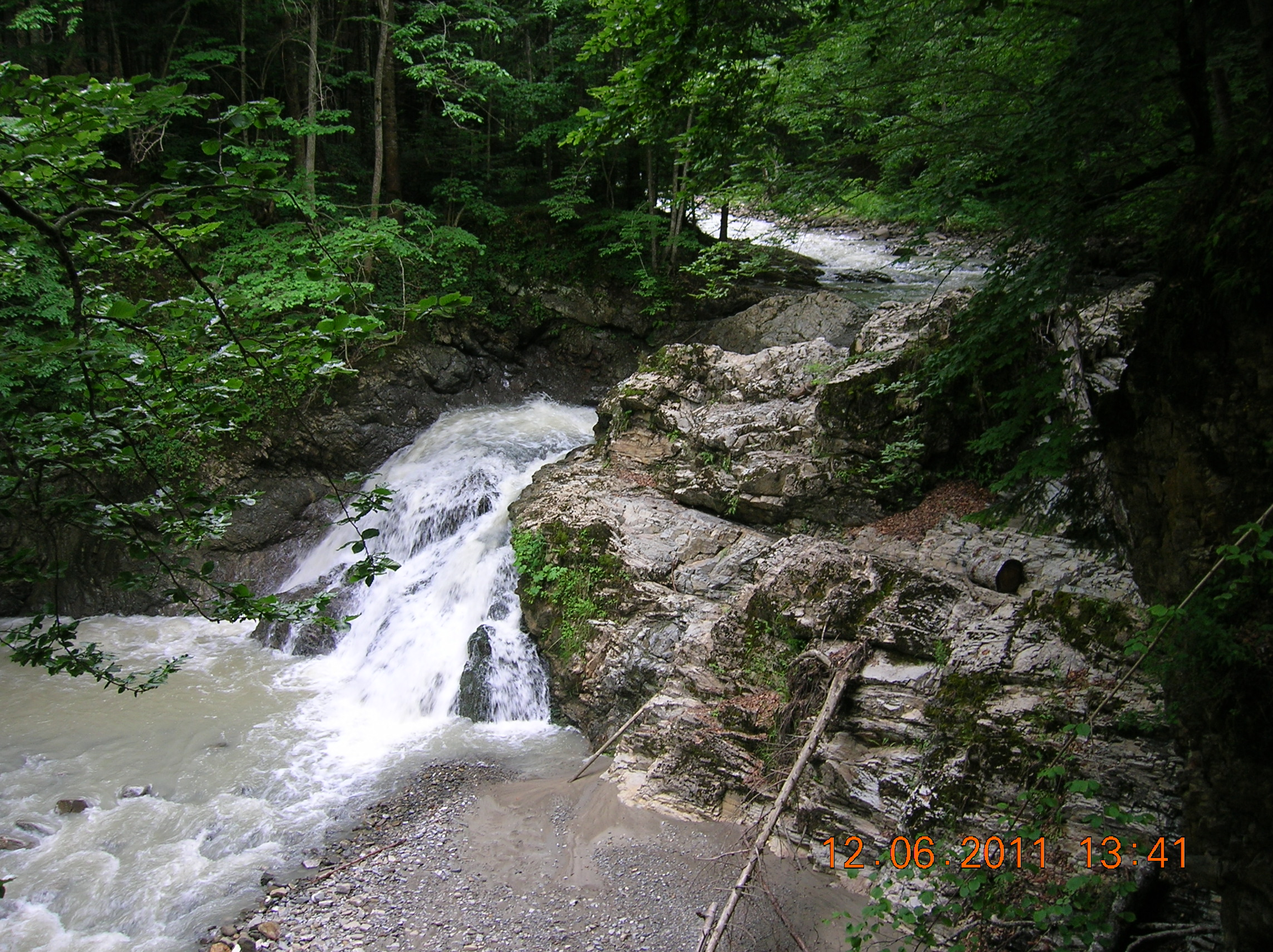 Munţii Tarcăului (Carpaţii Orientali, România)-Cascada Duras